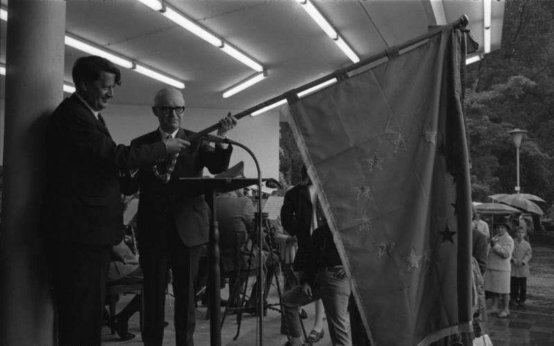 Bgm. (Erhard) Jakobsen (von Gladaxe und Reichstagsabgeordneter), Dänemark, überreicht Bgm. (Franz) Linz, Godesberg, eine Europafahne